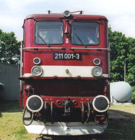 211 001 am 24. Mai 2003 bei einer Ausstellung in Weimar.